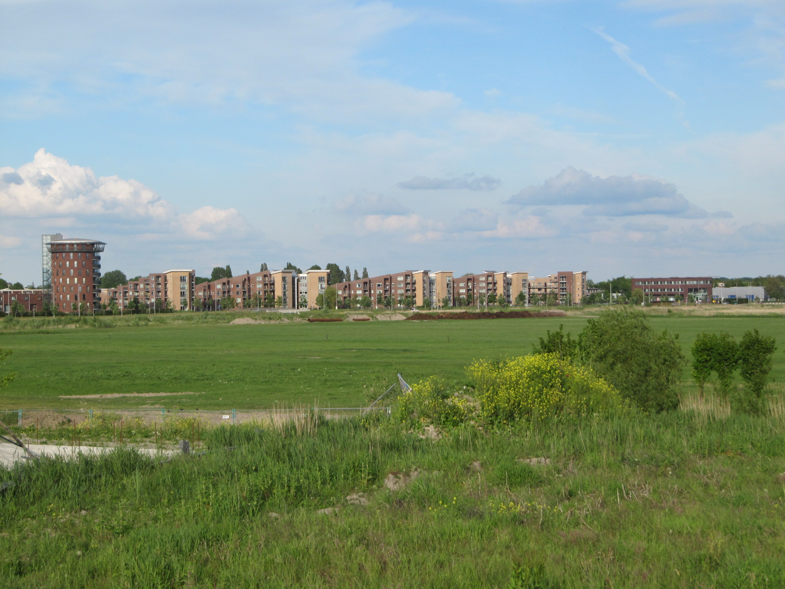 Skyline Bergeschenhoek